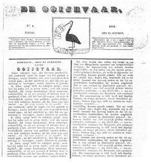 logo of the Dutch newspaper "De ooijevaar" 1845